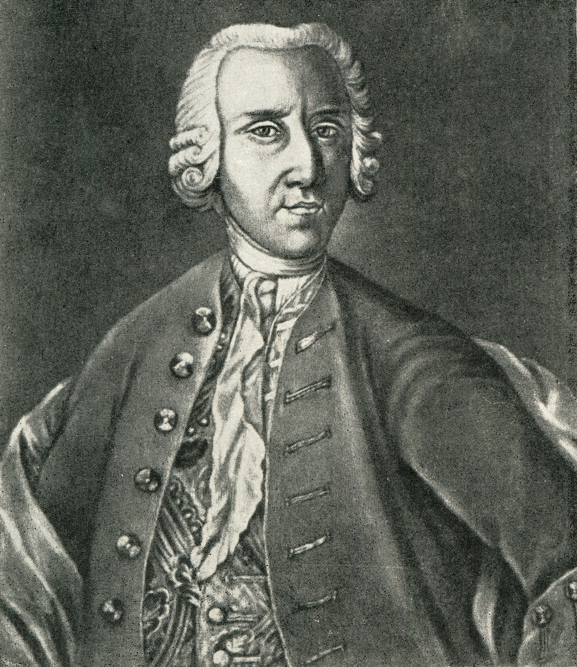 Академик Рихман